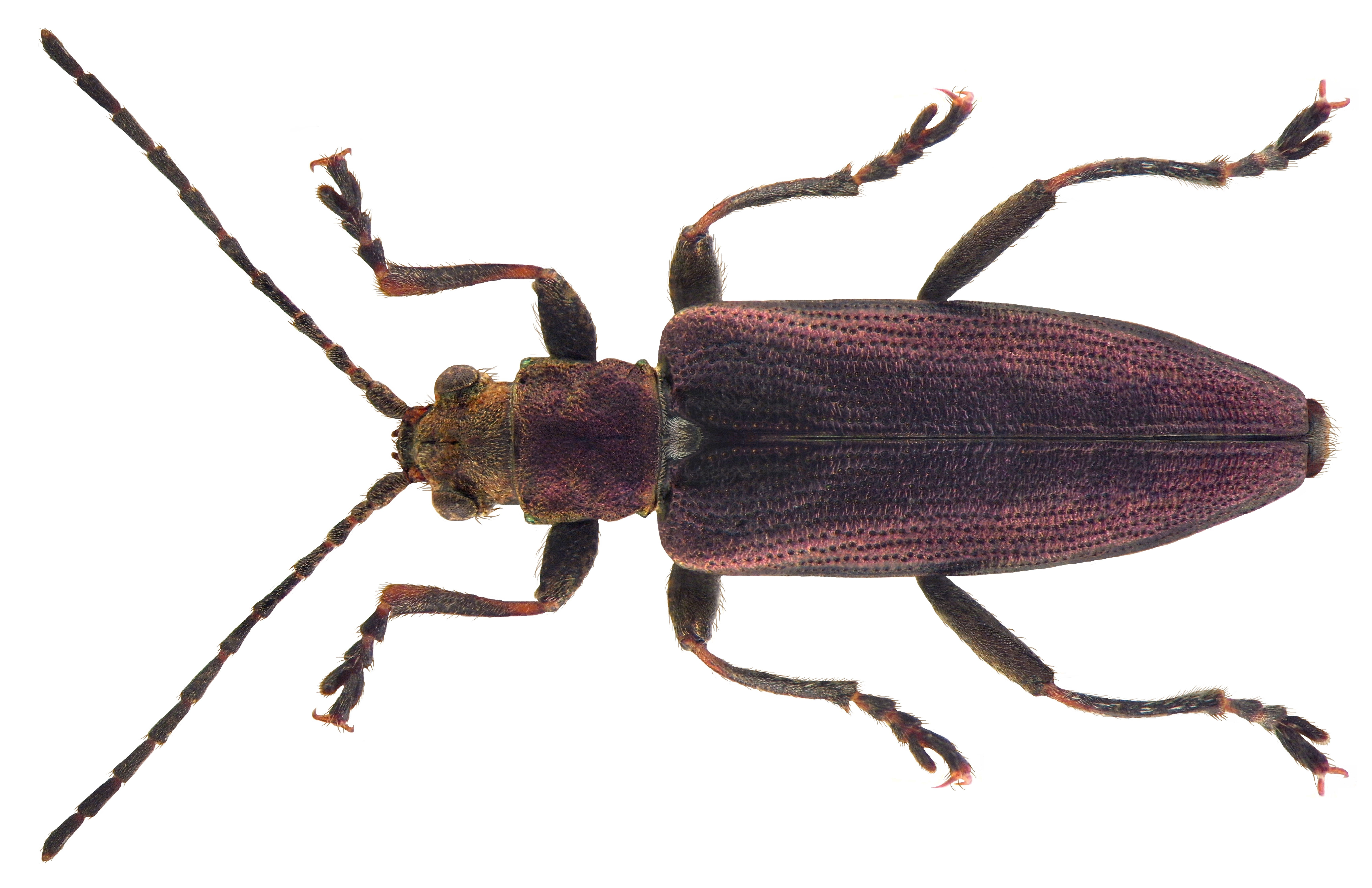 Donacia simplex Fabricius, 1775 Familie: Chrysomelidae Groesse: 7-8 mm Verbreitung: Europa Ökologie: an Glyceria-, Carex-, Sparganium- und Typha-Arten Fundort: Germania, Bayern, Oberfranken, Selbitz leg.det. U.Schmidt, 1973 Photo: U.Schmidt, 2010